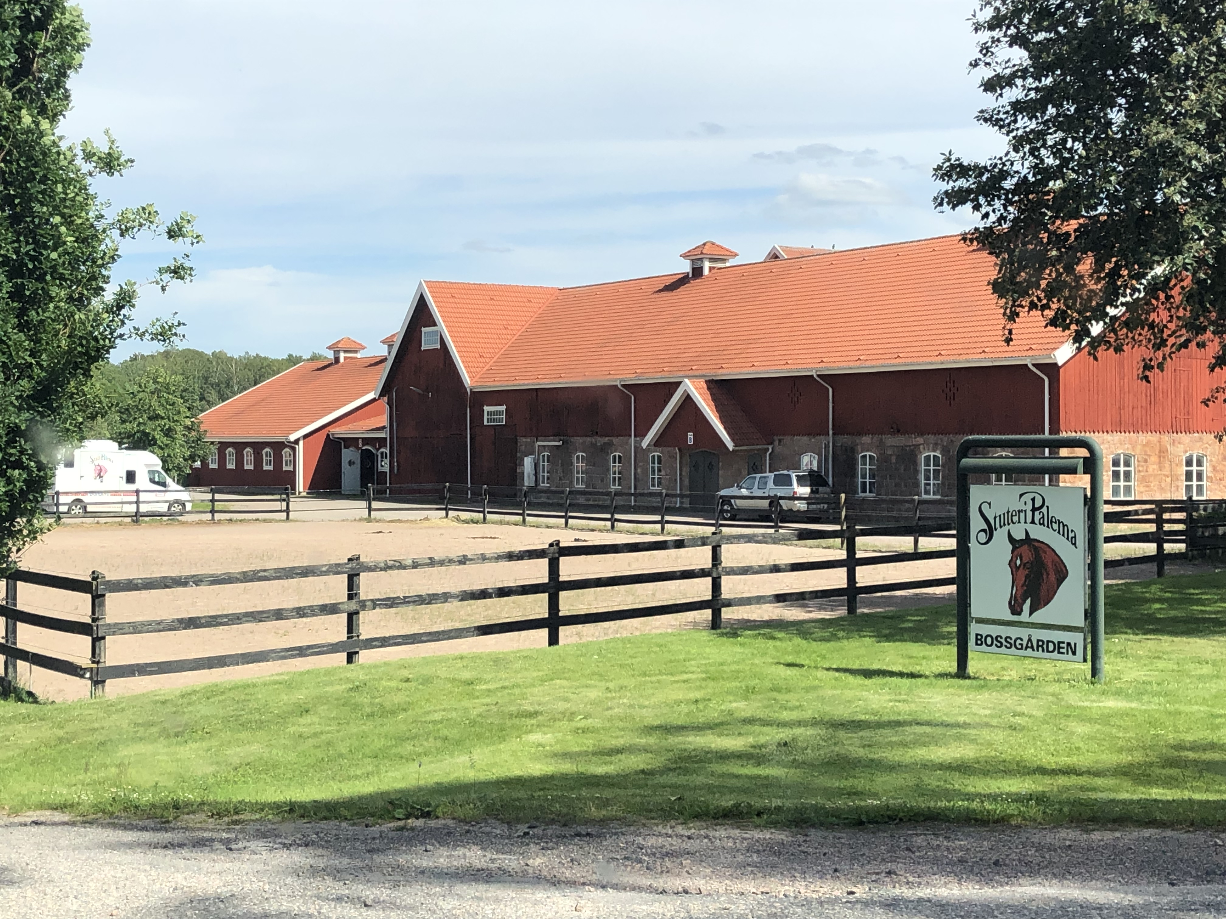 Stall & Stuteri Palema, juni 2019